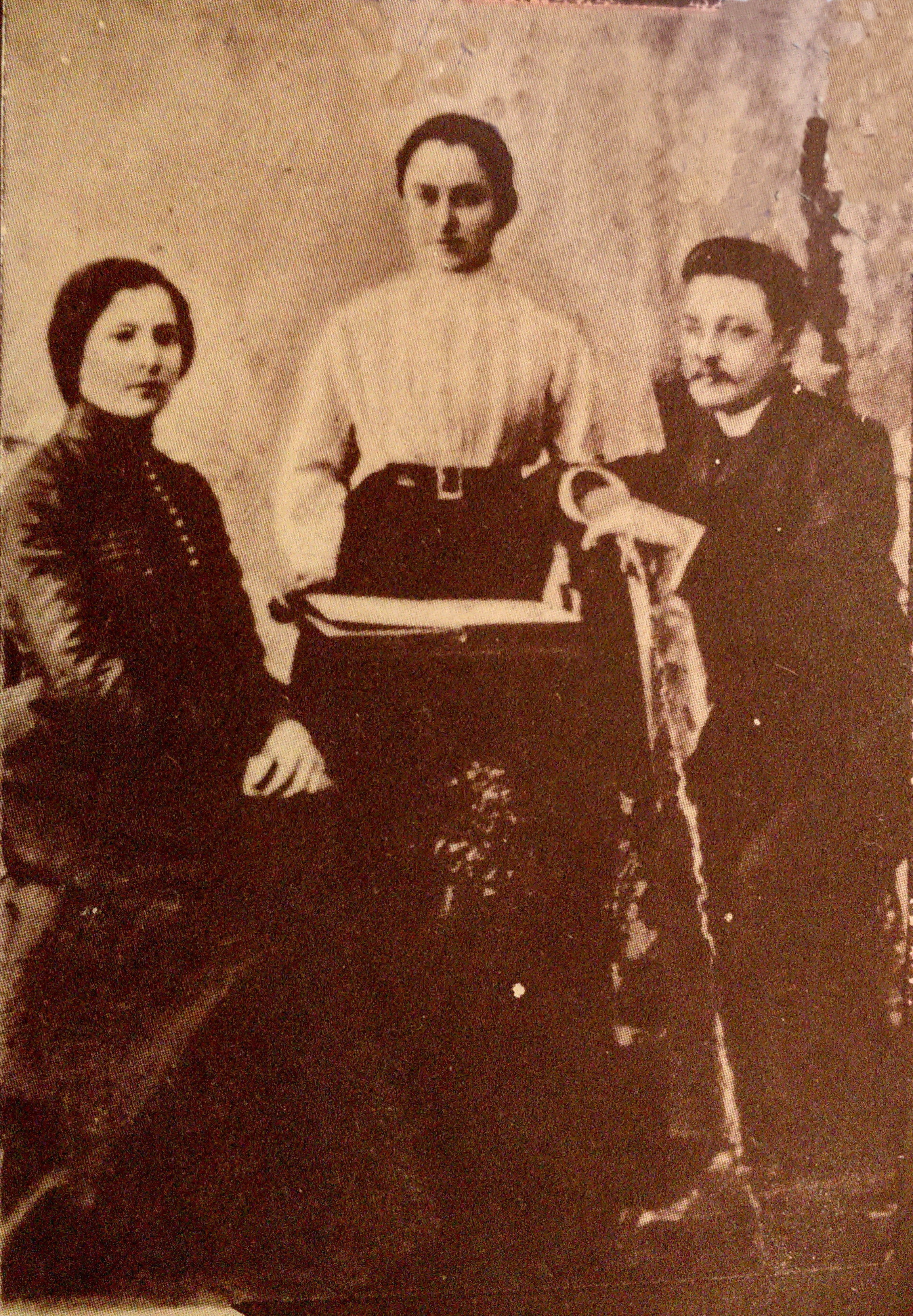 Вера Слуцкая с братом и сестрой.